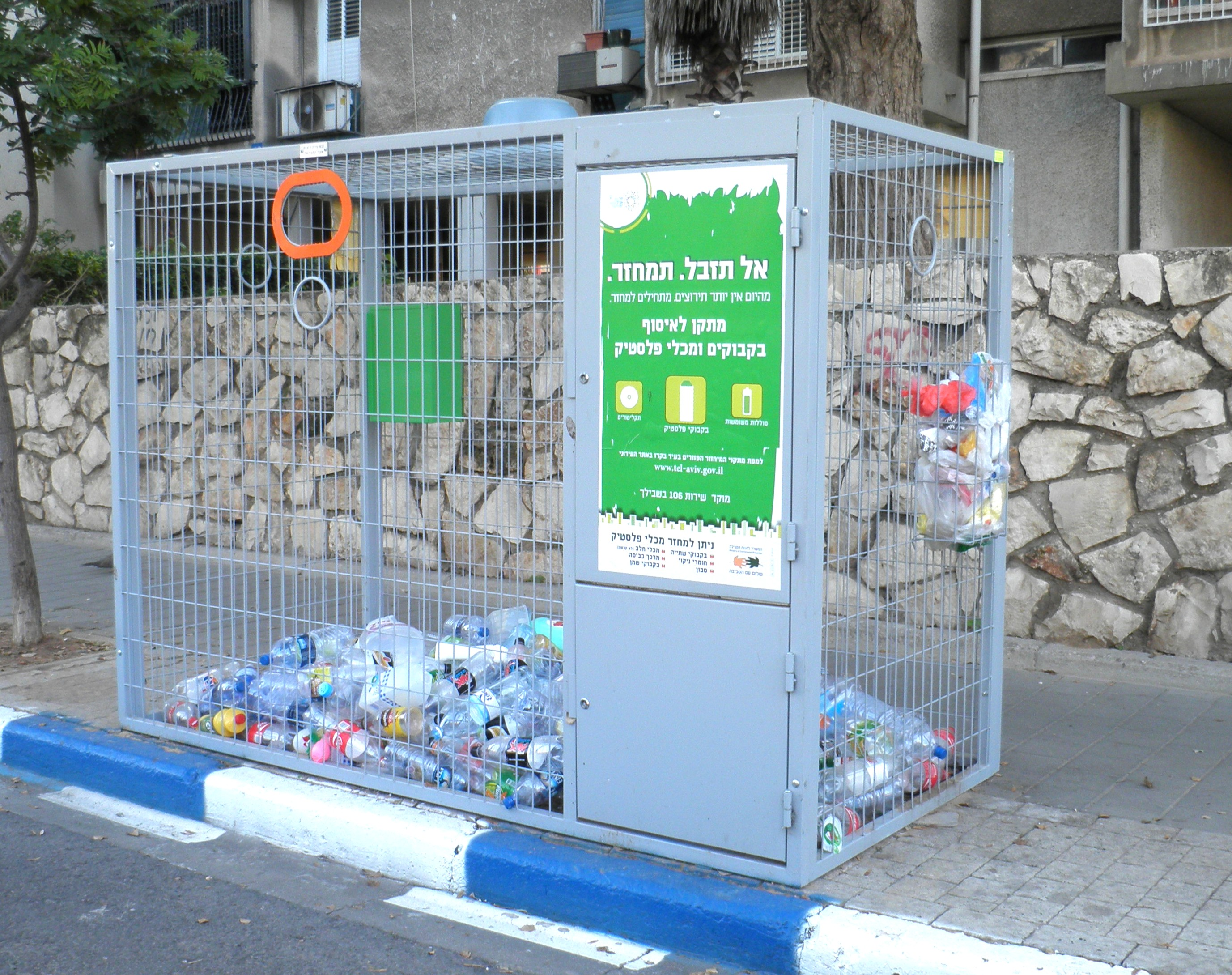 Hatikva Market recycling